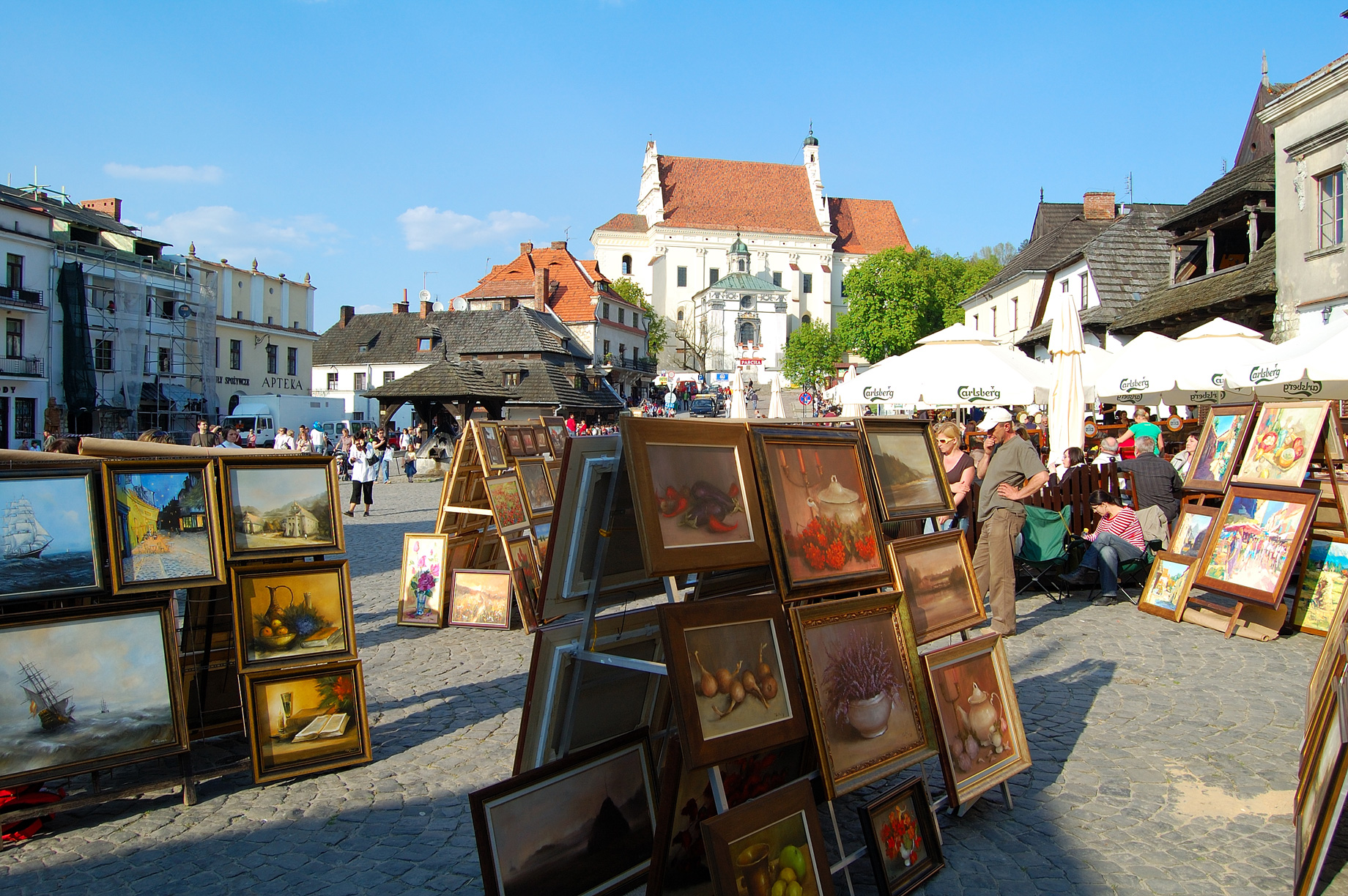 Wystawa obrazów na rynku